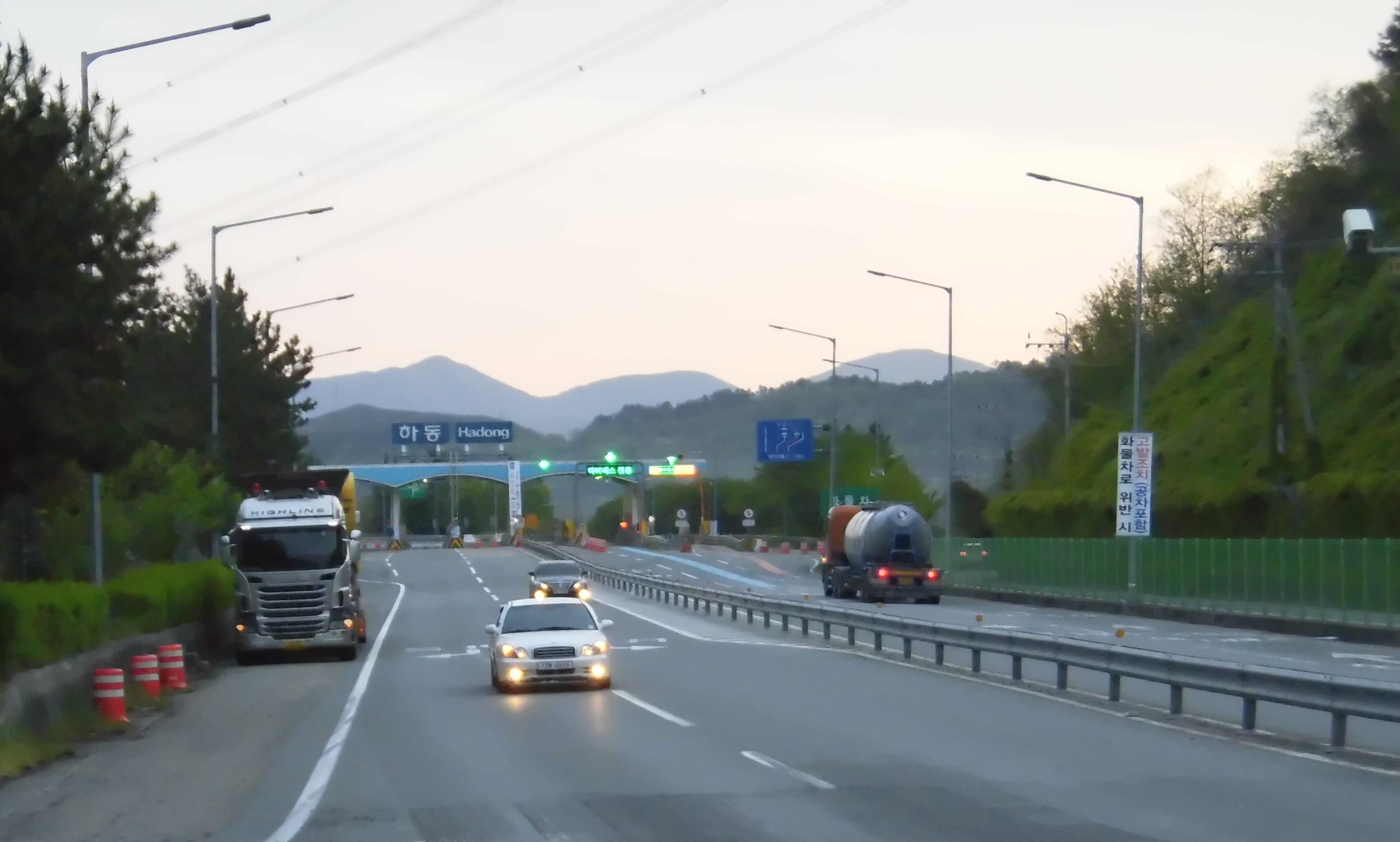 남해고속도로 하동나들목